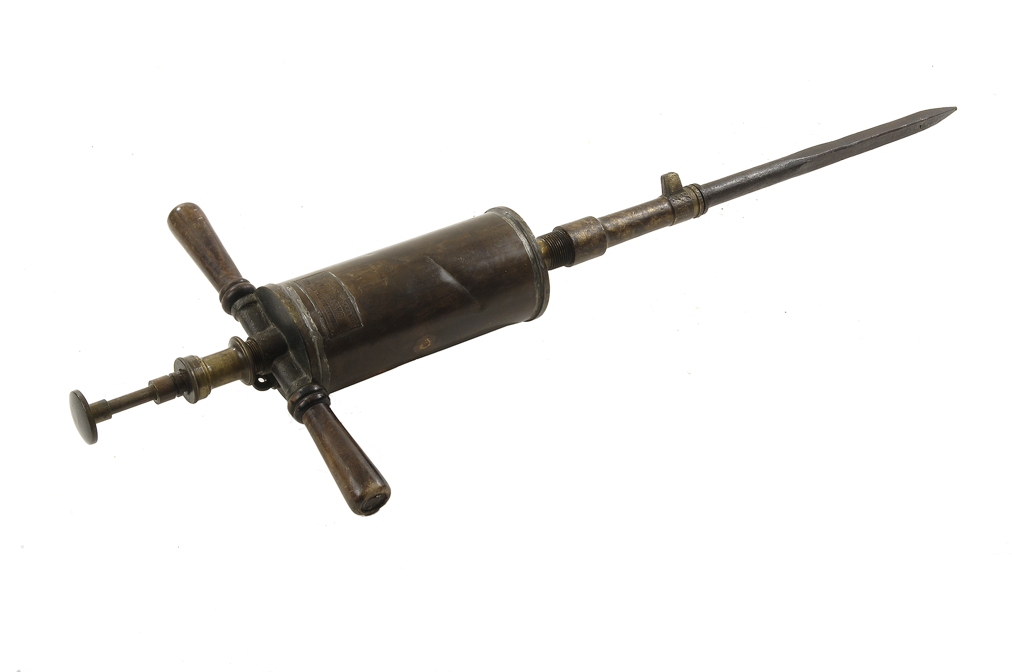 Fotografies dels objectes de l'exposició permanent de la sala "Secà i Muntanya" del Museu Valencià d'Etnologia - Fotografies de Mateo Gamon. Xeringa per a injectar sofre a les arrels de la vinya. Època de la fil·loxera. Segle XIX.